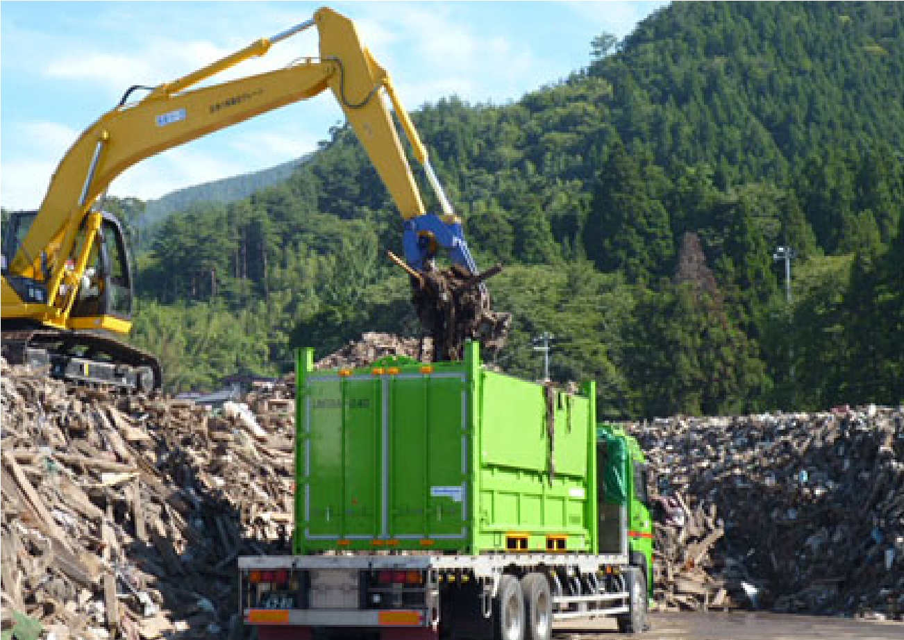 岩手県／大槌町の災害廃棄物はコンテナで、東京都へ鉄道輸送される。 ※①、原版はプライバシー保護の為に、低画質で公開されている。 ※②、原版を投稿者『パッションウエイ』にて、拡大加工実地。